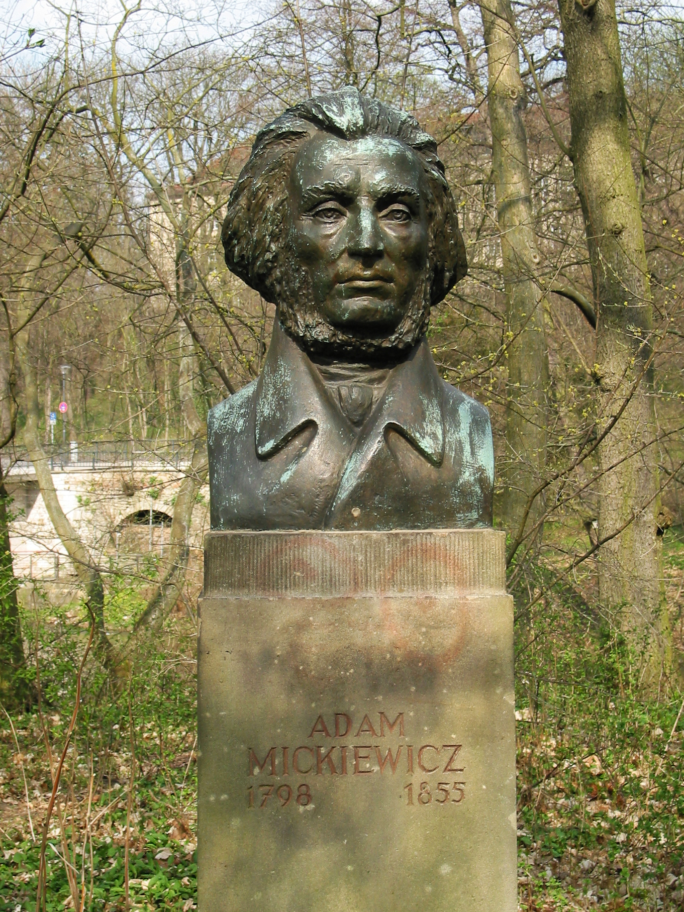 Büste in Weimar zu Ehren von Adam Mickiewicz. Standort zwischen Ilm und Stadtschloss.